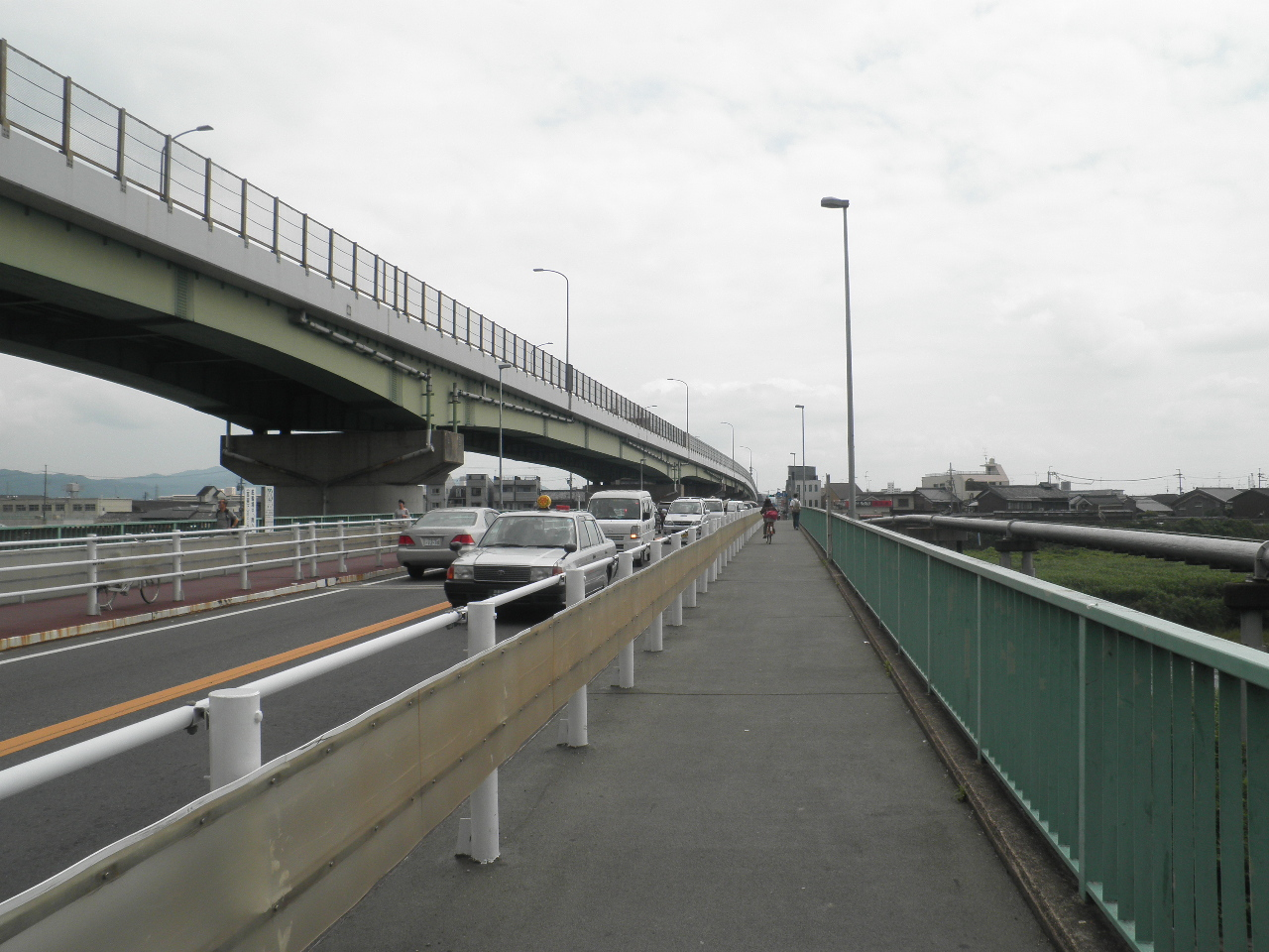 2階建て構造の観月橋